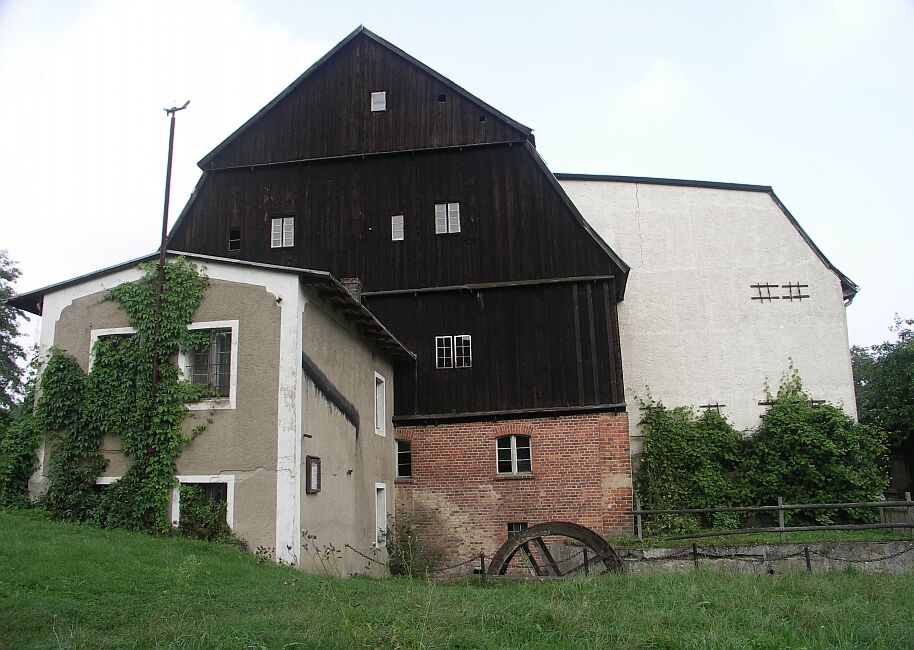 Watermill Boitzenburg, Germany